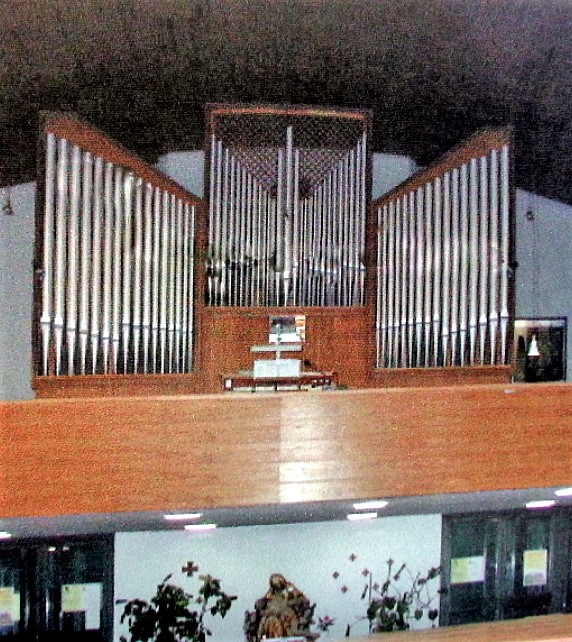 Mayer-Orgel in Gersweiler (Saarbrücken)